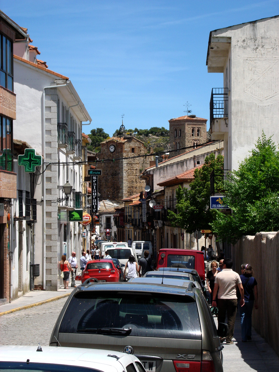 Calle Real de Buitrago del Lozoya, arteria principal del municipio. Nace en la entrada al recinto amurallado, atraviesa la Plaza de la Constitución, pasa por la Plaza Picasso (donde se encuentra el Ayuntamiento y el Museo Picasso) y finalmente acaba en la Avenida de Madrid.